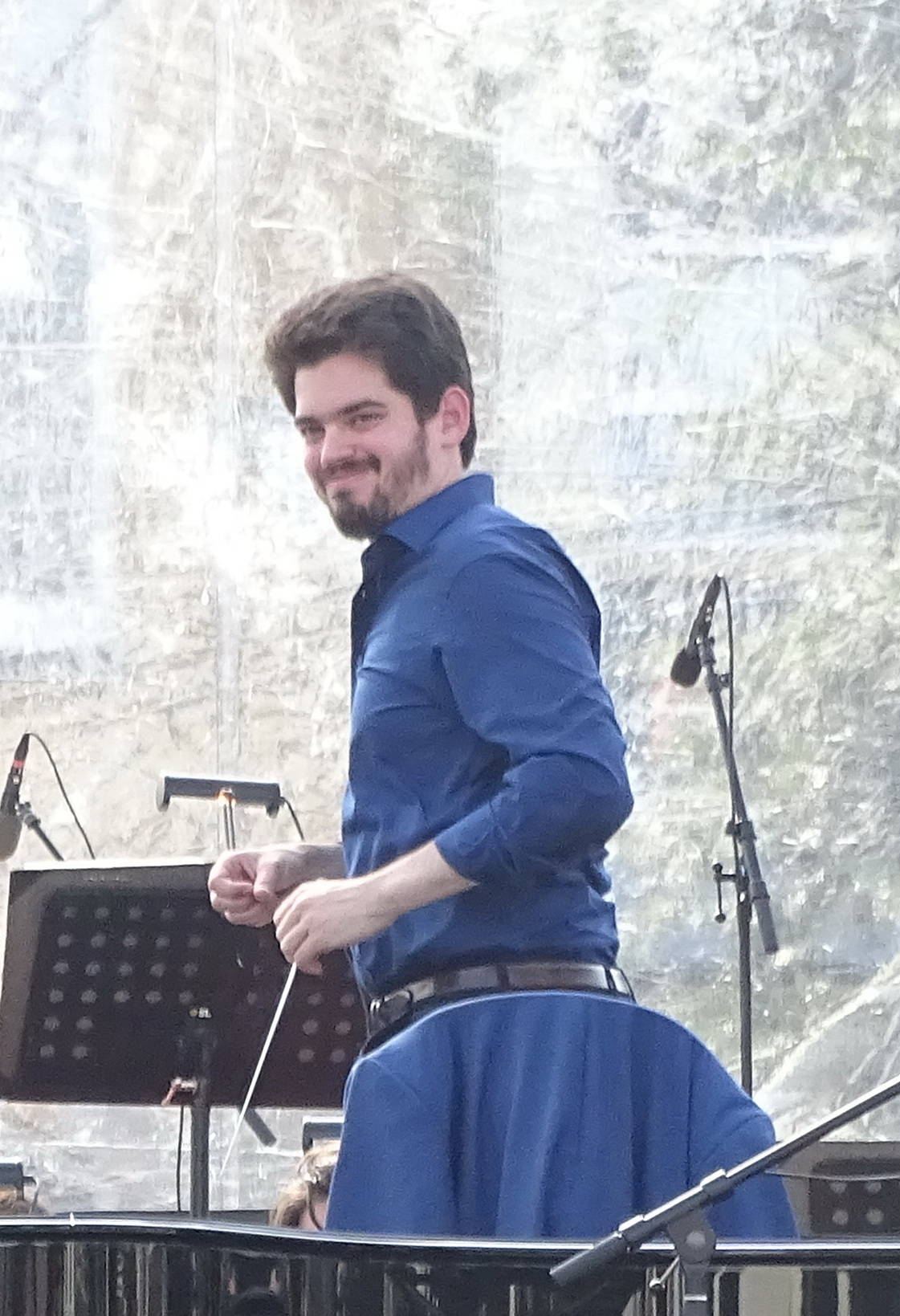 Lahav Shani tijdens de generale repetitie voor het Veerhavenconcert 2017 in Rotterdam.